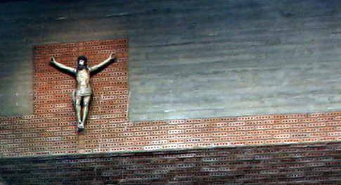 Kruzifix in der Kirche Christi Auferstehung in Köln